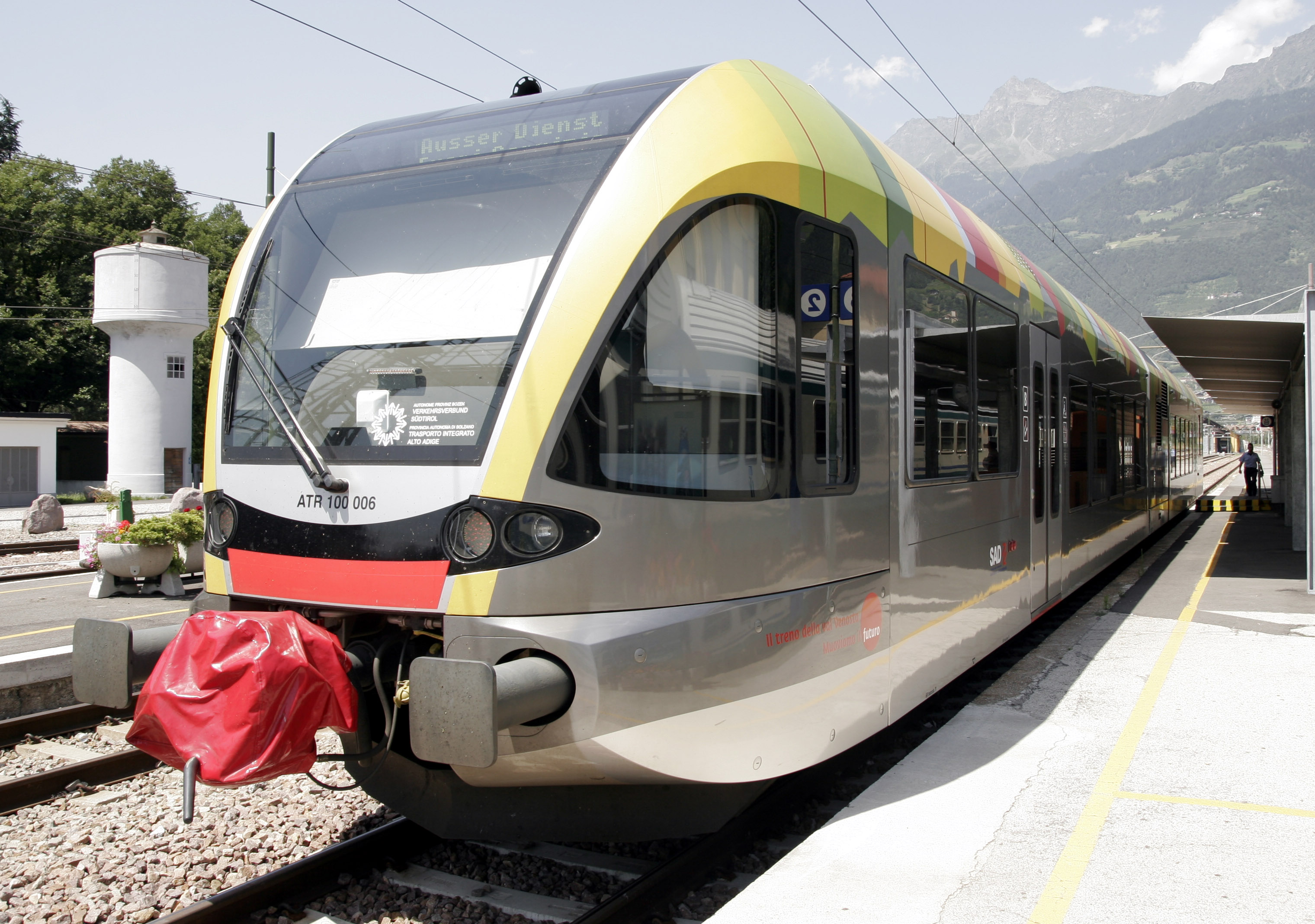 Die Vinschgerbahn im Bahnhof von Meran